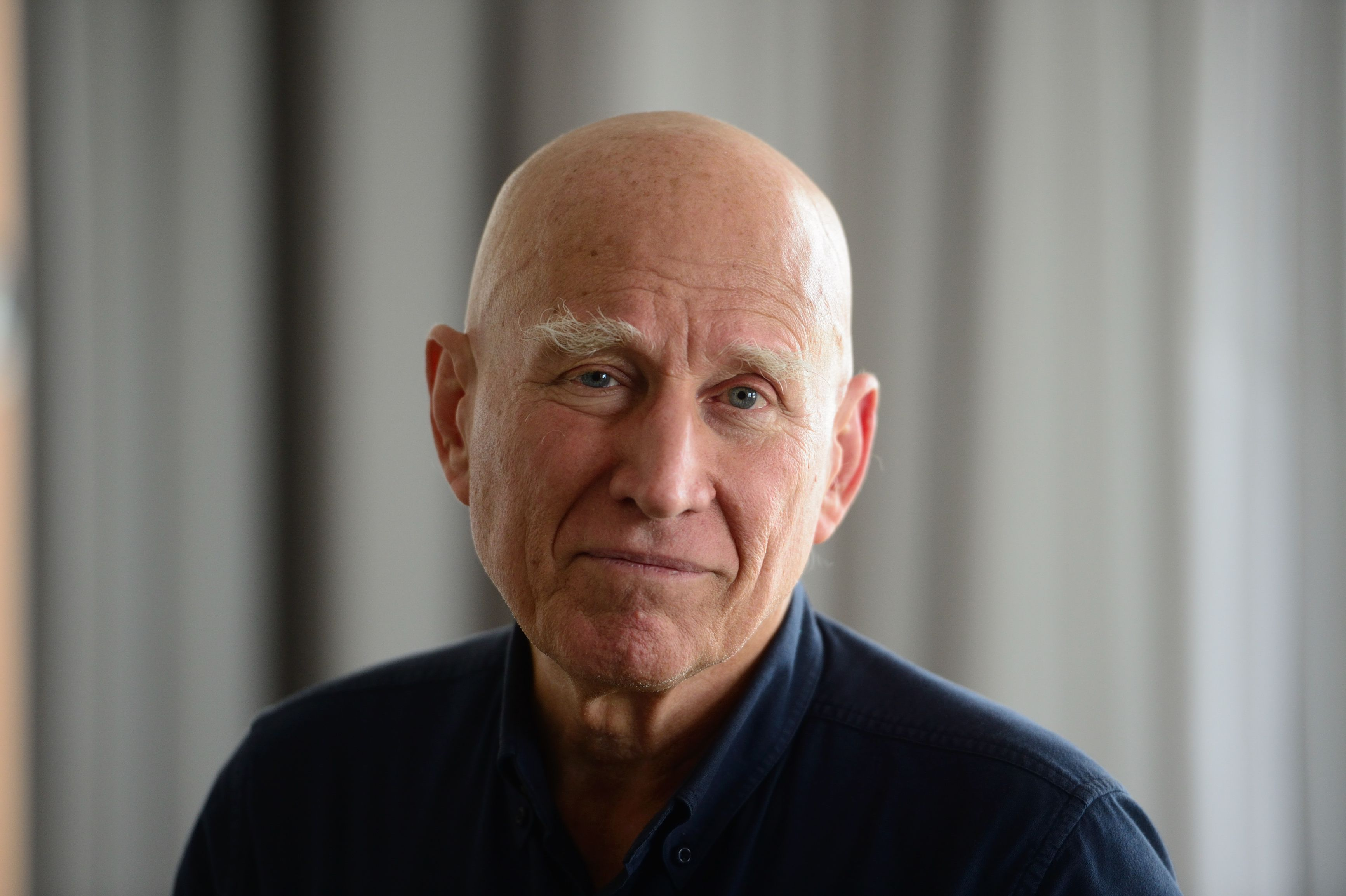 Rio de Janeiro - O fotógrafo e ambientalista Sebastião Salgado, fundador do Instituto Terra, fala sobre o Prêmio Personalidade da Câmara de Comércio França-Brasil